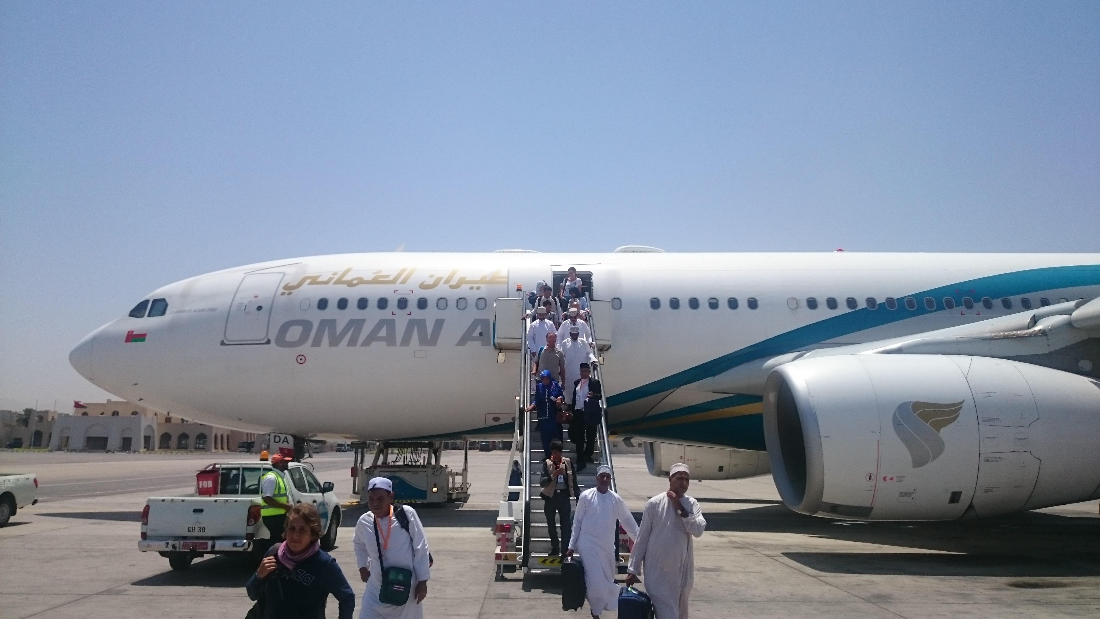 Ein Airbus A330-200 der Oman Air auf dem internationalen Flughafen von Maskat Anfang September 2015.